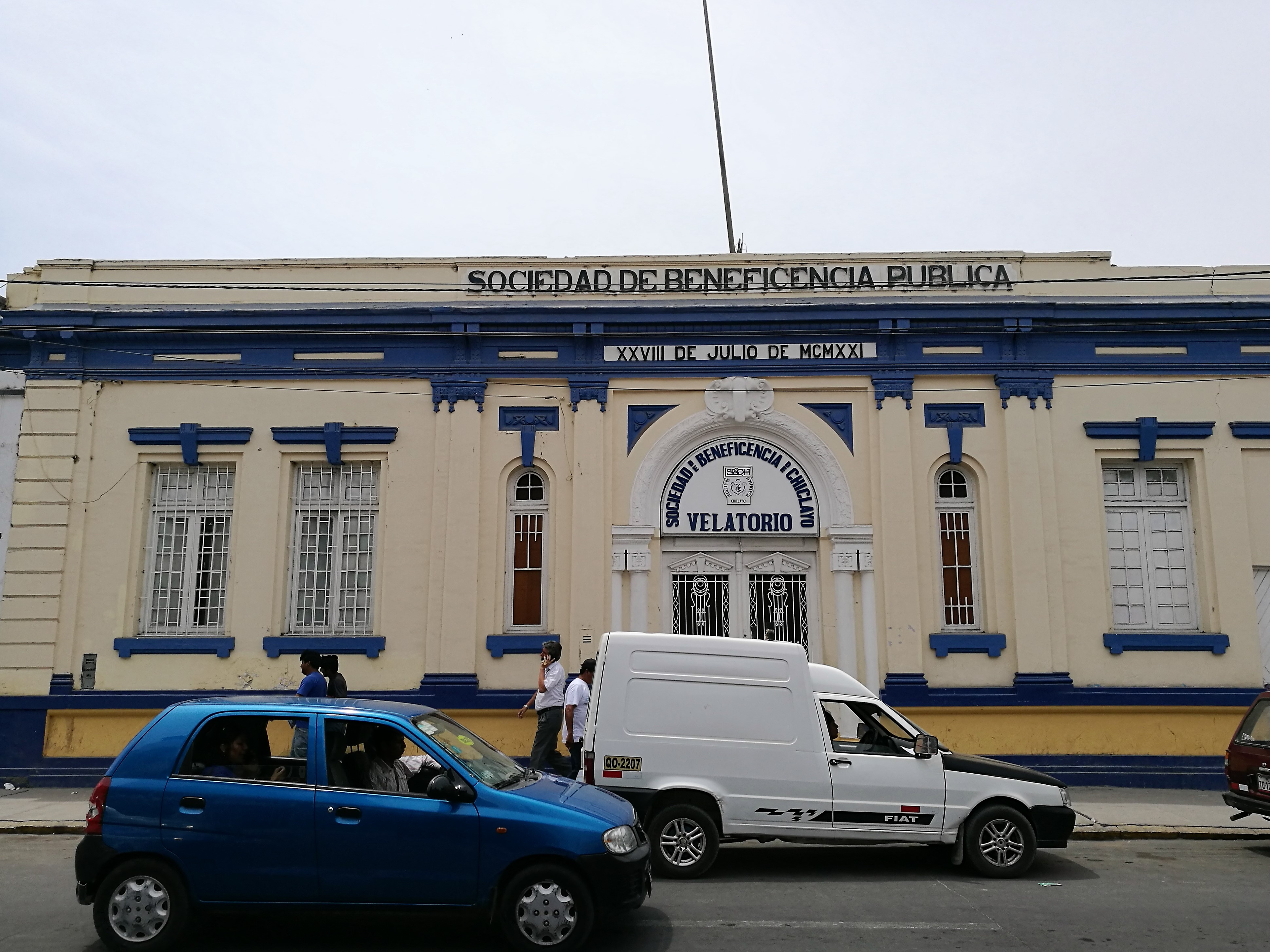 Edifici del Velatorio de la Sociedad de Beneficiencia Pública